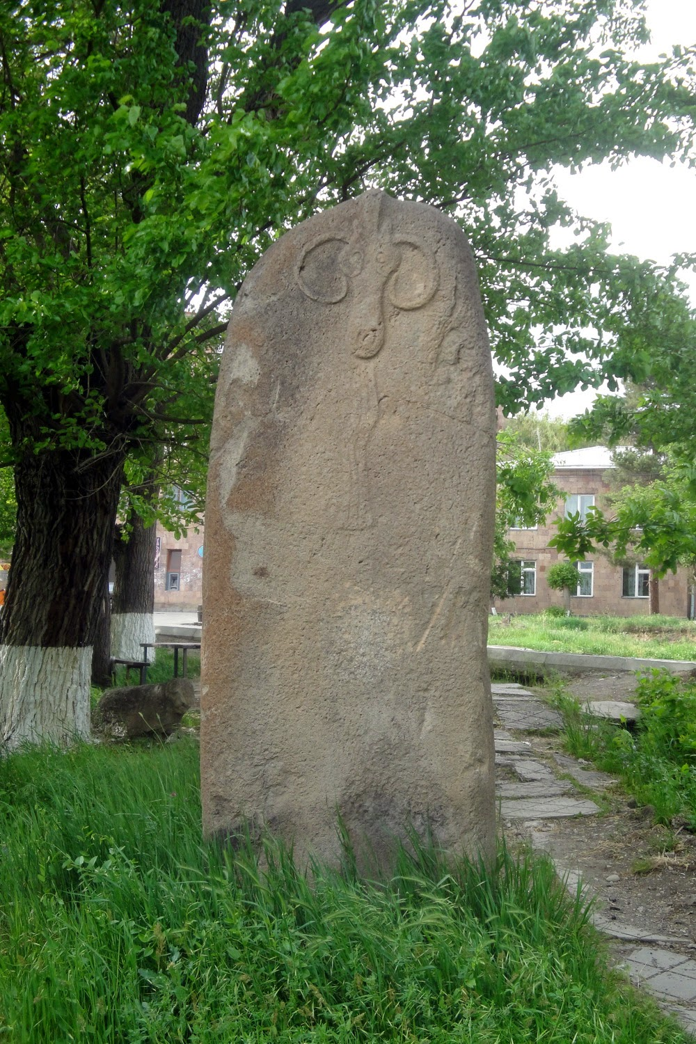 Yeghegnadzor, Vishap, 2014.05.11